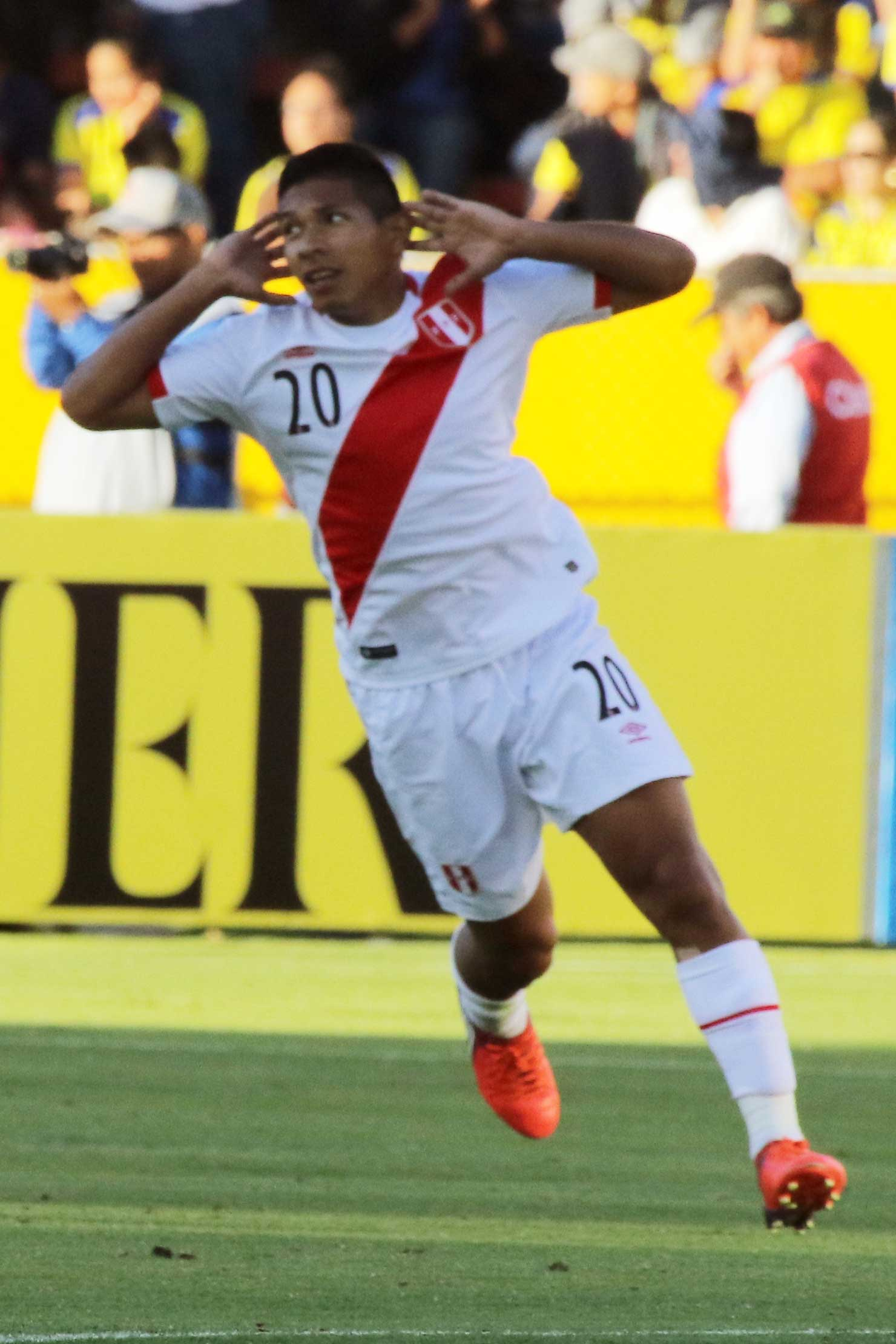 Quito 5 Sep (Andes).- Encuentro por eliminatorias Rusia 2018 entre Ecuador y Perú. Fotografías: Carlos Rodríguez/Andes.